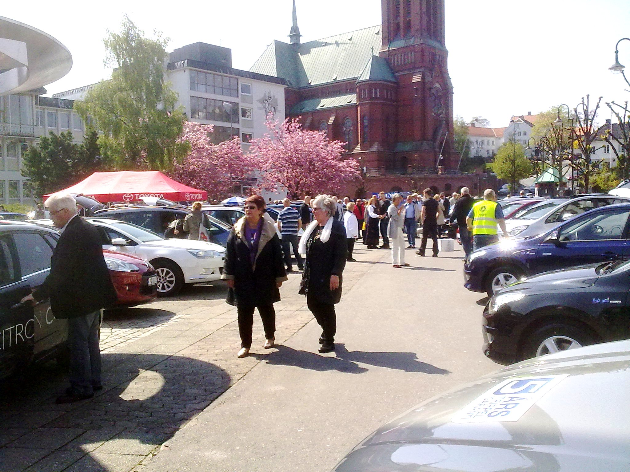 Arendal Bilmesse 2011